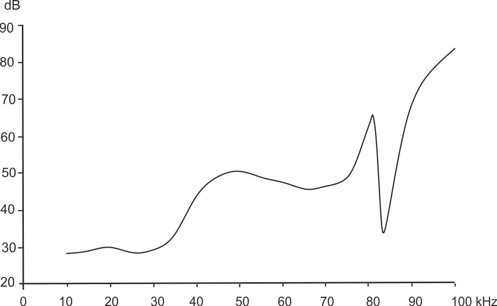 Une bande d'extrême sensibilité à 82-83 kHz contiguë à une bande de sensibilité basse